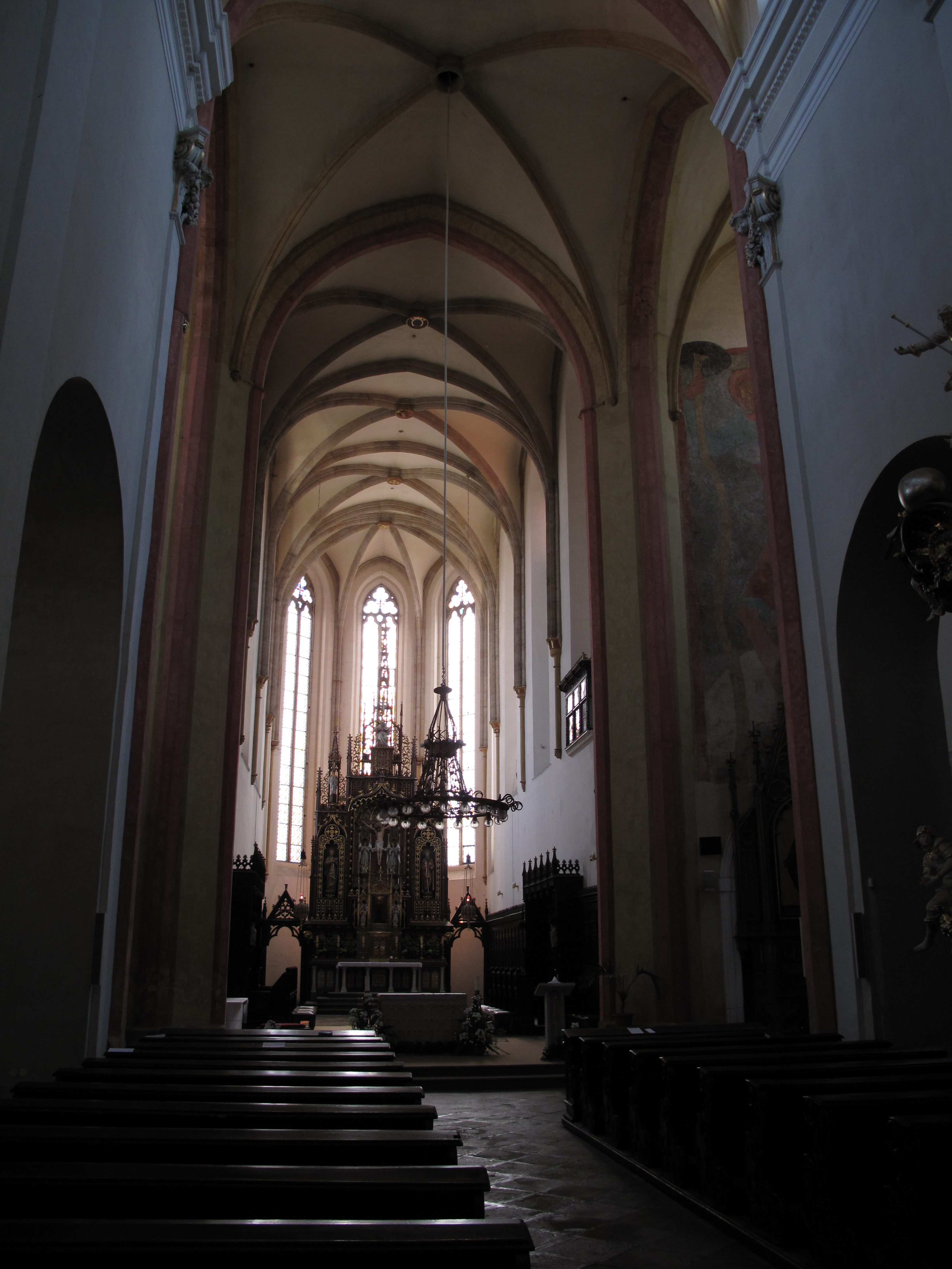 Interiér kostela Obětování Panny Marie. České Budějovice, Česká republika.